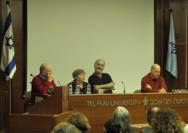 דיון לאחר הקרנת הסרט "הסרט שלא היה" בהשתתפות הבמאי רם לוי ונציגי הוועד הציבורי נגד עינויים בישראל